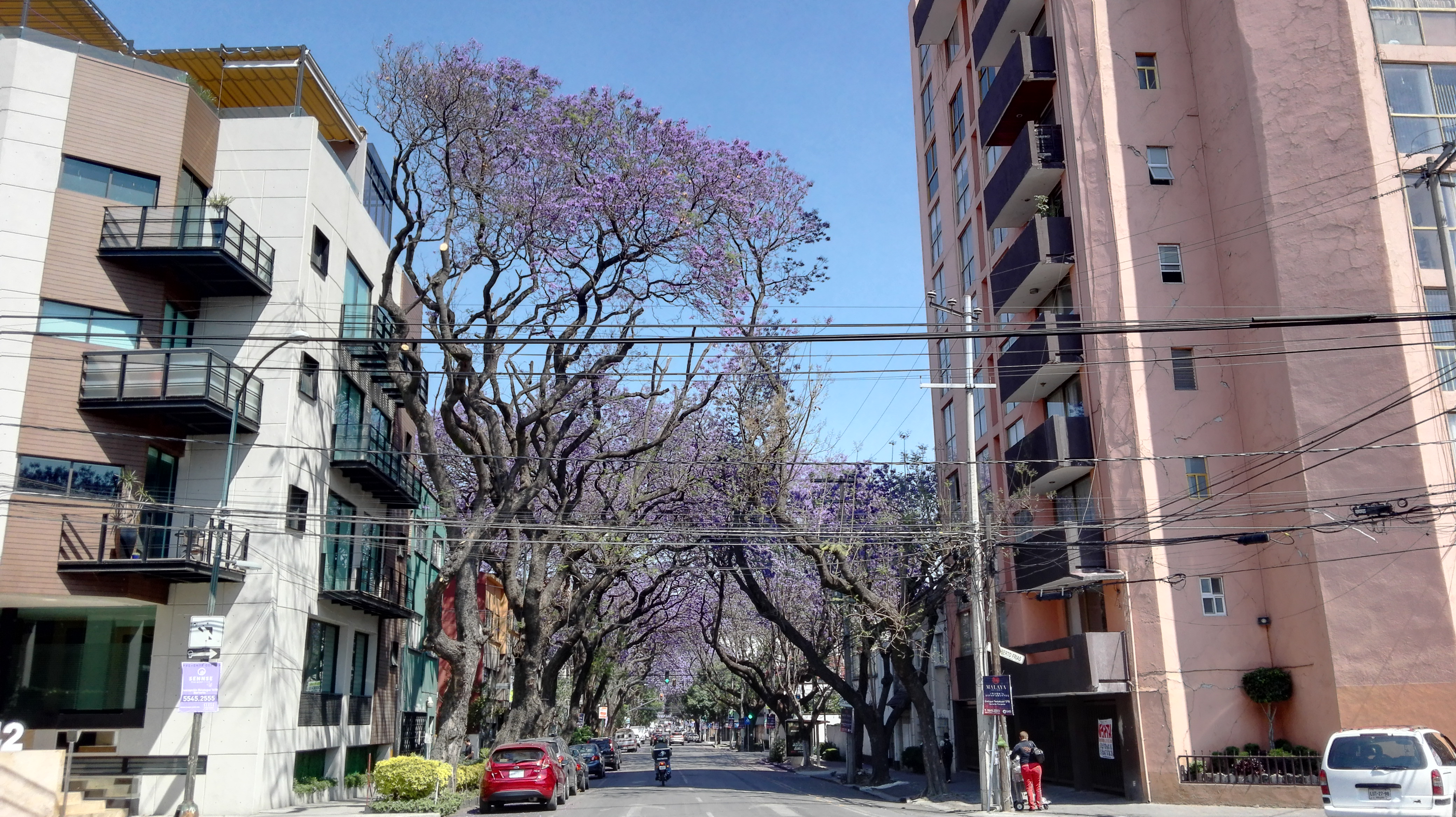 Jacarandas en flor en la colonia Narvarte Poniente